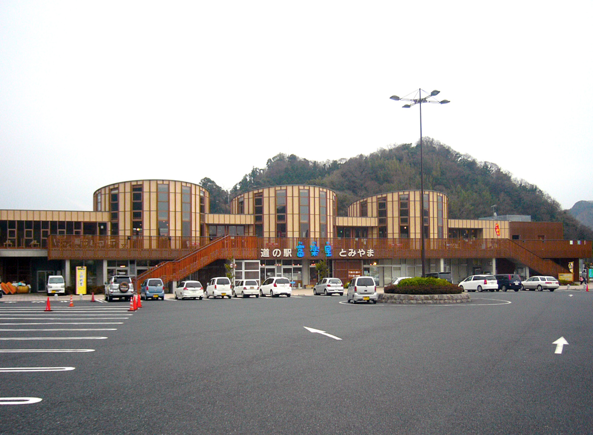 Michinoeki Furari Tomiyama (道の駅富楽里とみやま Chiba)